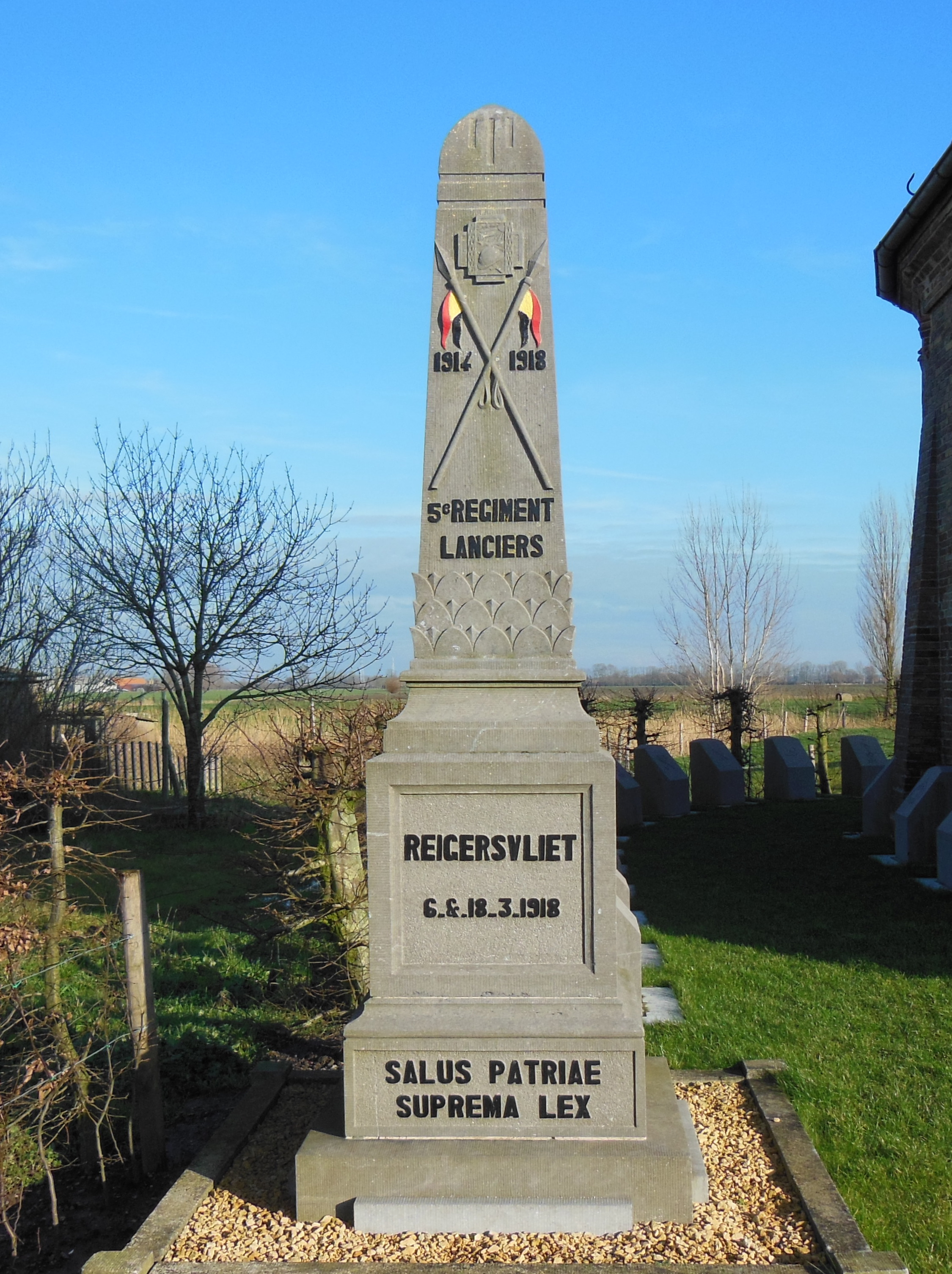 Een zuil op een sokkel met afbeelding van een wapenschild, lansen en opschriften ter herinnering aan de wapenfeiten van het 5de Lanciersmonument